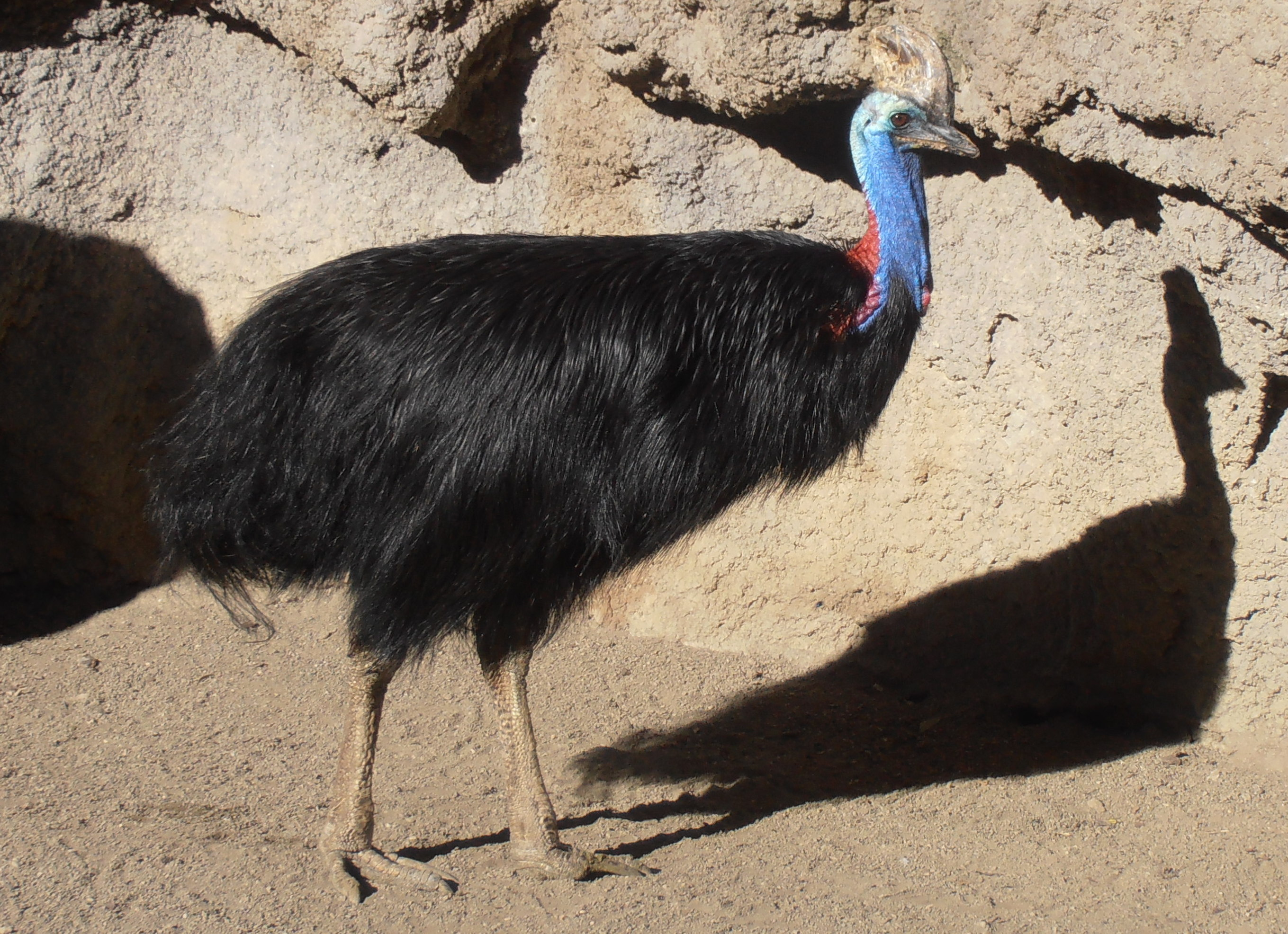 Casuario australiano (Bioparc di Fuengirola)